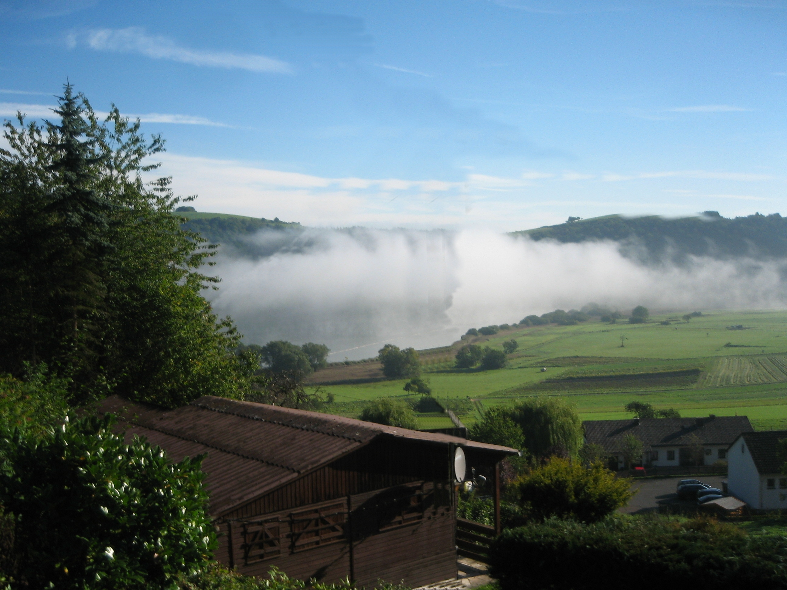 Meerfelder Maar im Morgennebel im September 2010